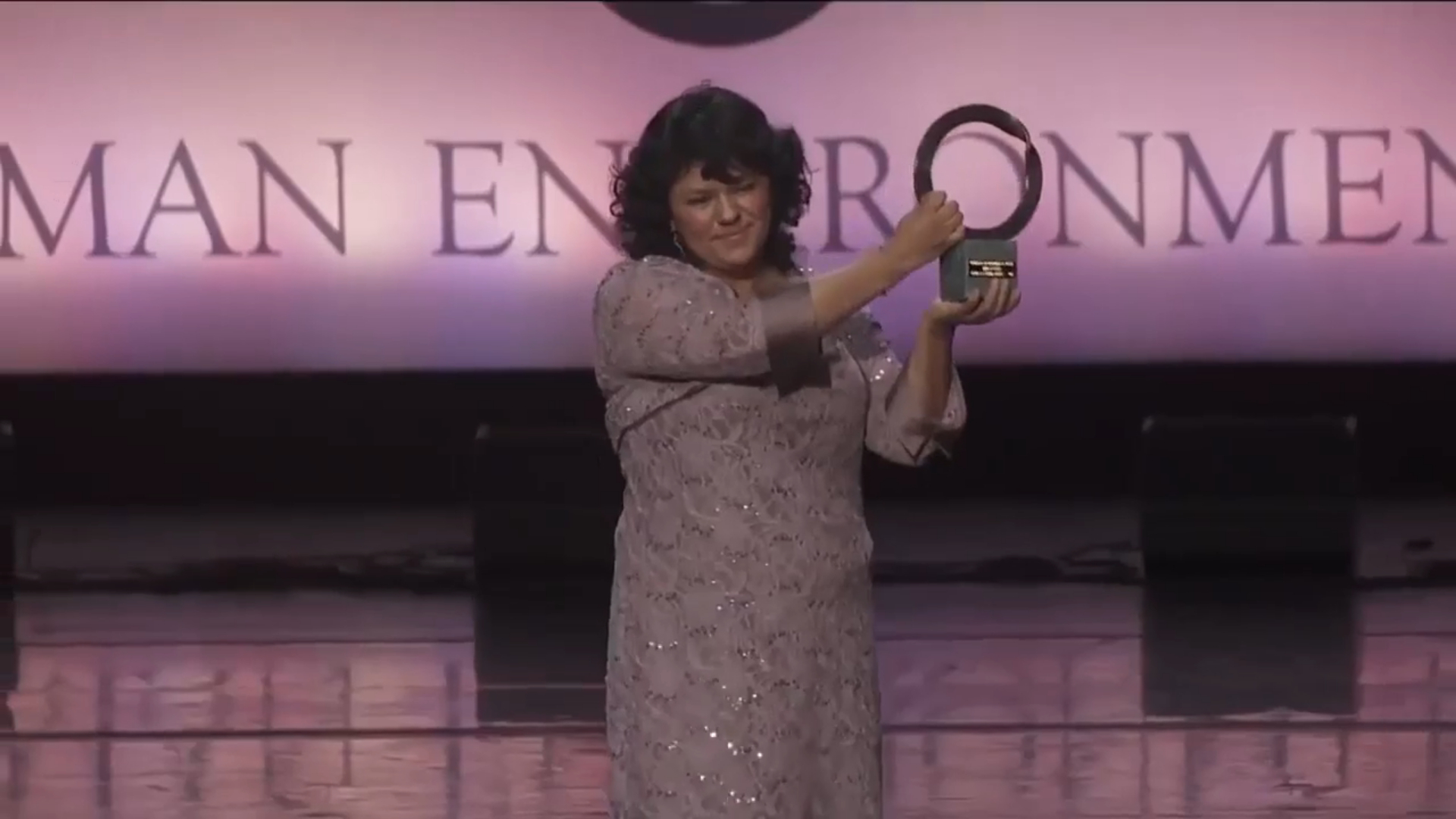 Berta Cáceres, activista por los derechos de los pueblos indígenas, recibe el premio medioambiental Goldman en 2015. - Fotograma del video de homenaje por el premio póstumo Champions of Earth 2017, de ONU Medio Ambiente.